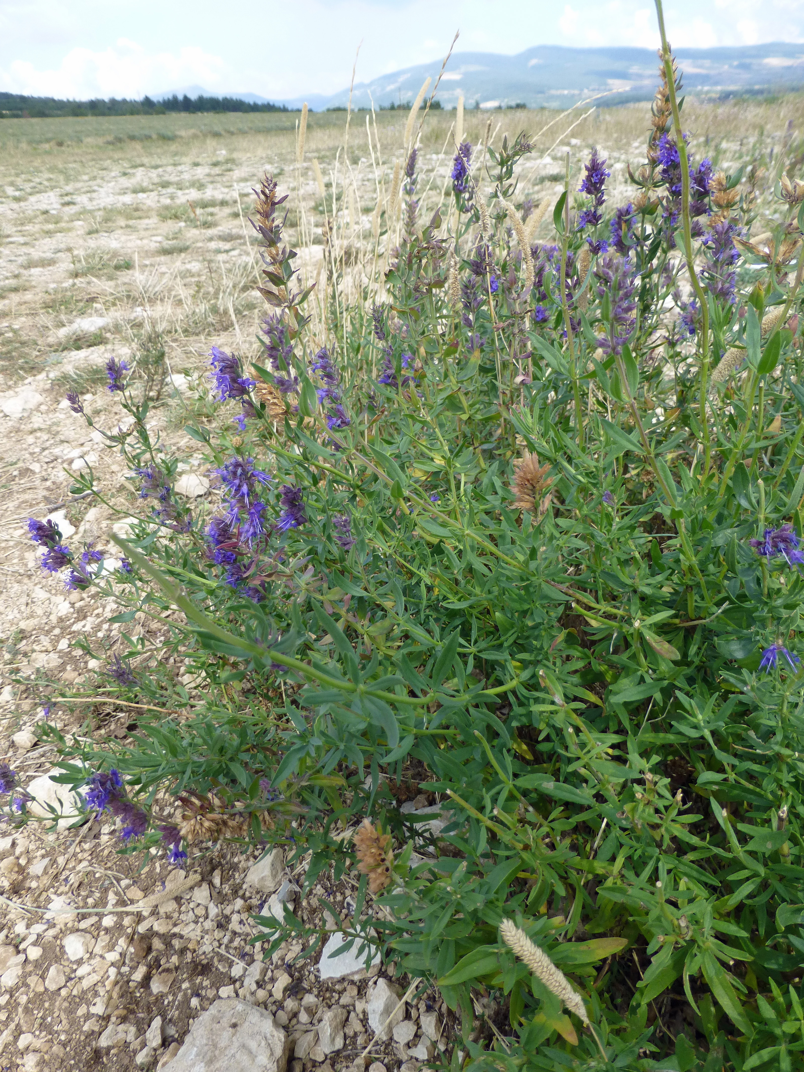 Lavandula latifolia (ou lavande aspic) en fleurs, fin août près de Sault (Vaucluse)